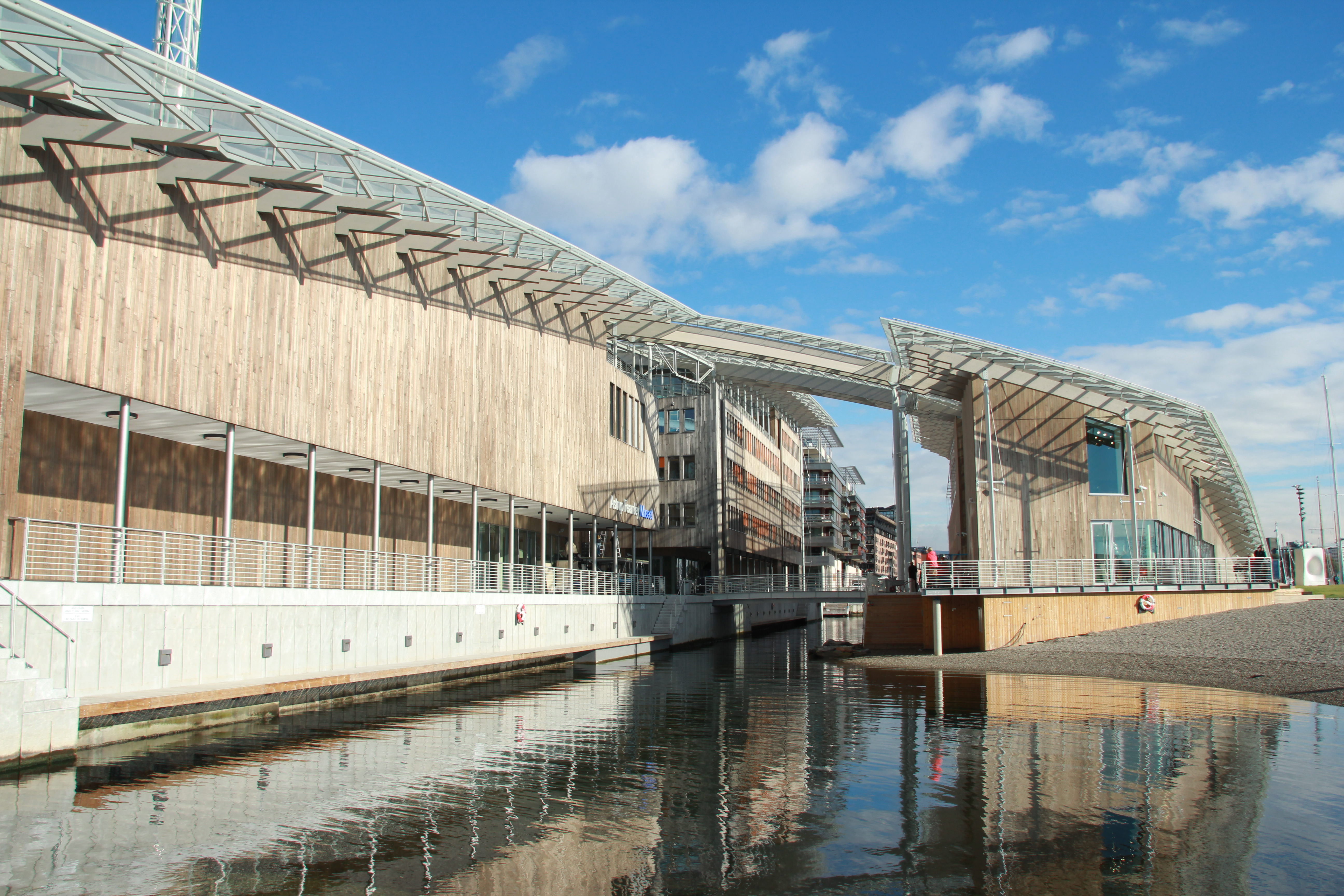 Astrup Fearnley Museet for Moderne Kunst, Oslo. Oppført 2012. Arkitekt Renzo Piano.